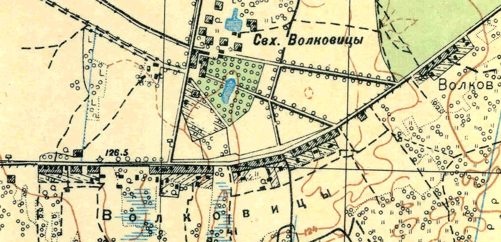 Топографическая карта Ленинградской области, квадрат О-35-24-Б-а (Переярово), деревня Волковицы